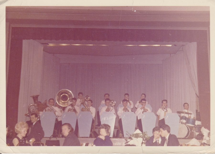 bal de Mélodia, dans sa composition de 14 musiciens, à Chailly sur Lausanne, vers 1965.